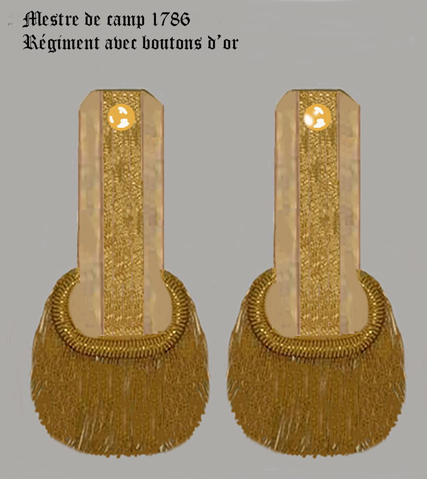 Mestre de camp de cavalerie royal française“